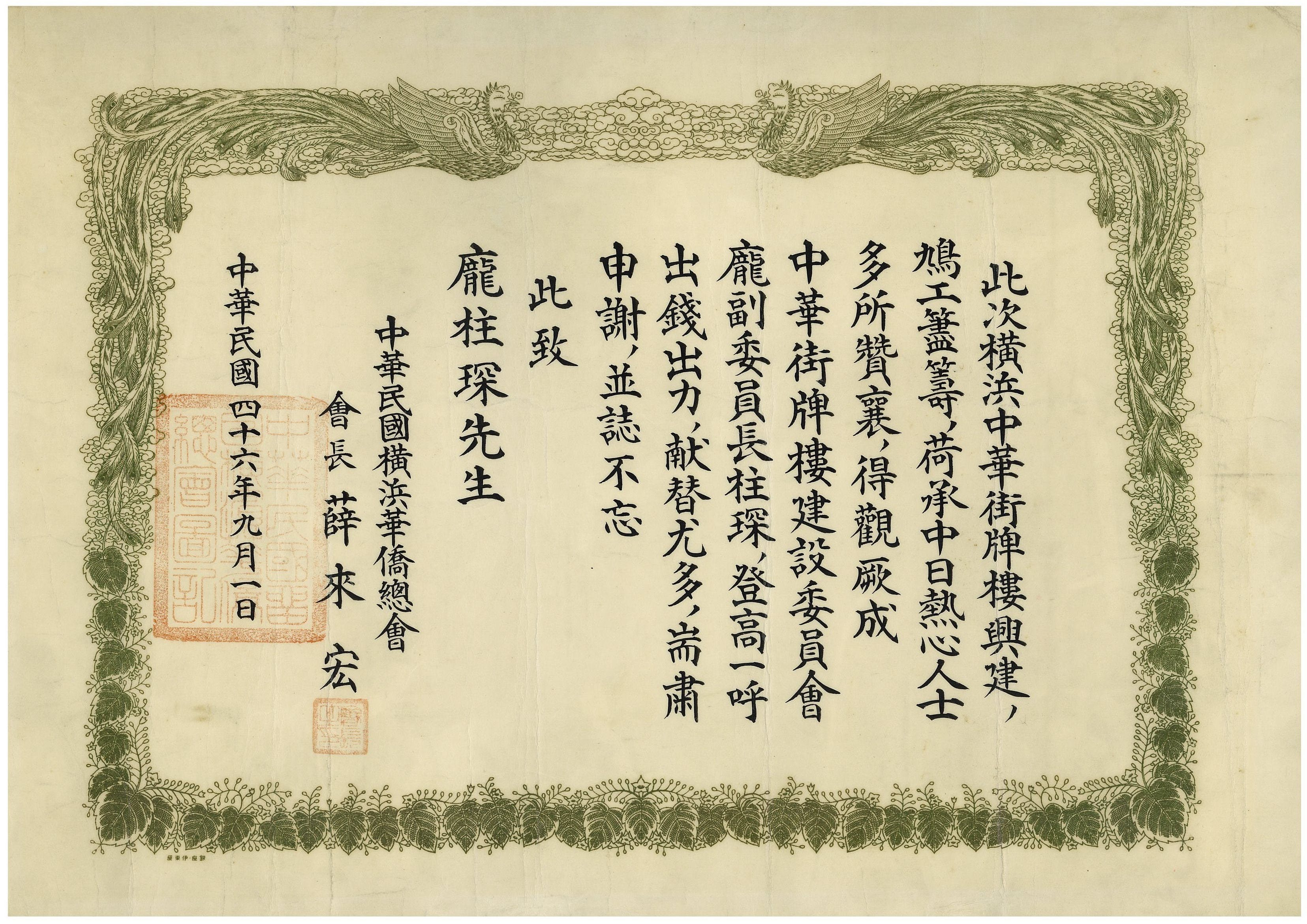 株式会社聘珍樓